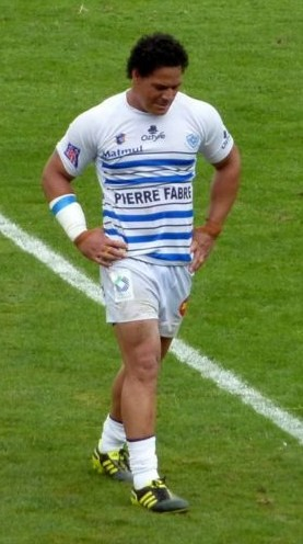 Chris Masoe du club de rugby à XV Castres olympique.